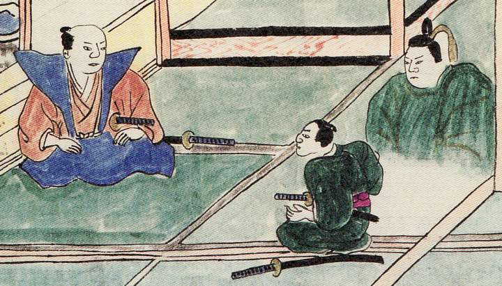 Ino Budayu Ichidaiki (稲生武太夫一代記)